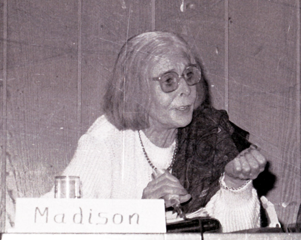 Annemarie Madison während ihrer Sieben-Städte-Tour 1986 in München